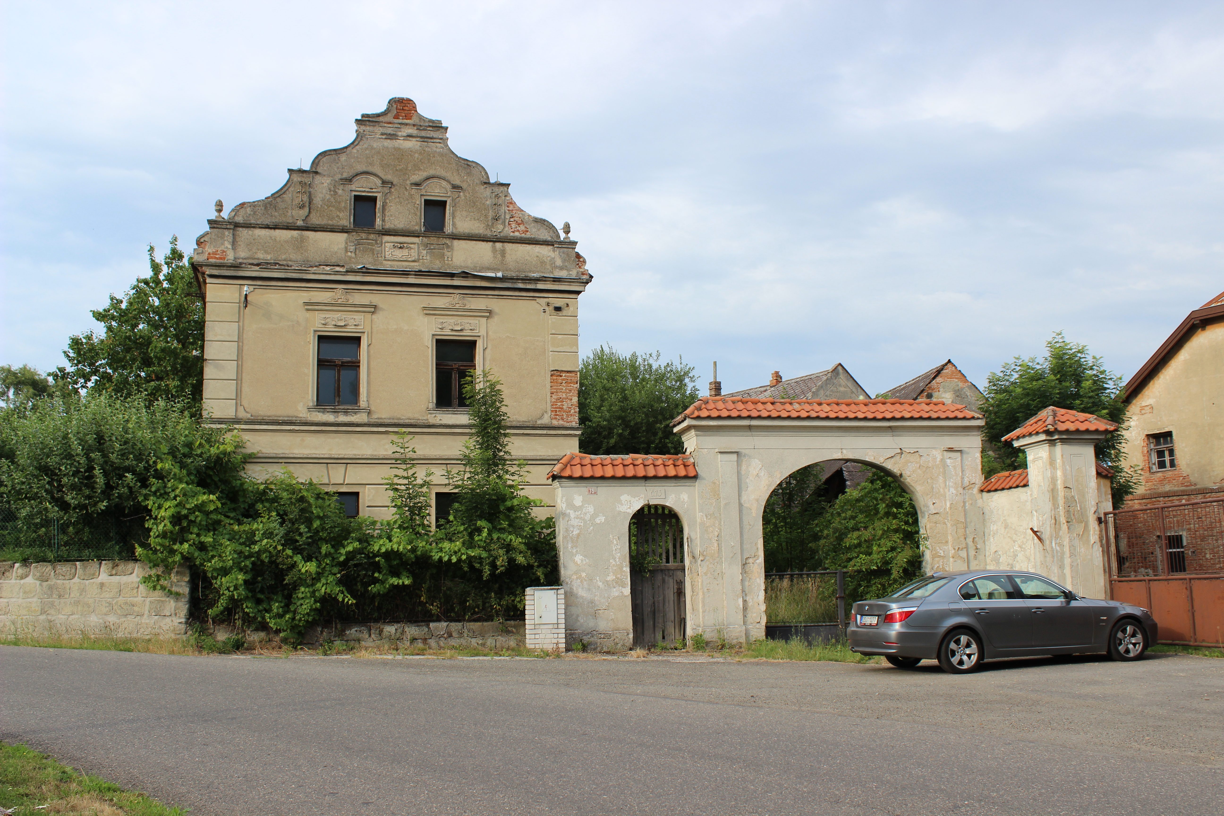 Dům číslo popisné 15 v Malých Všelisech.